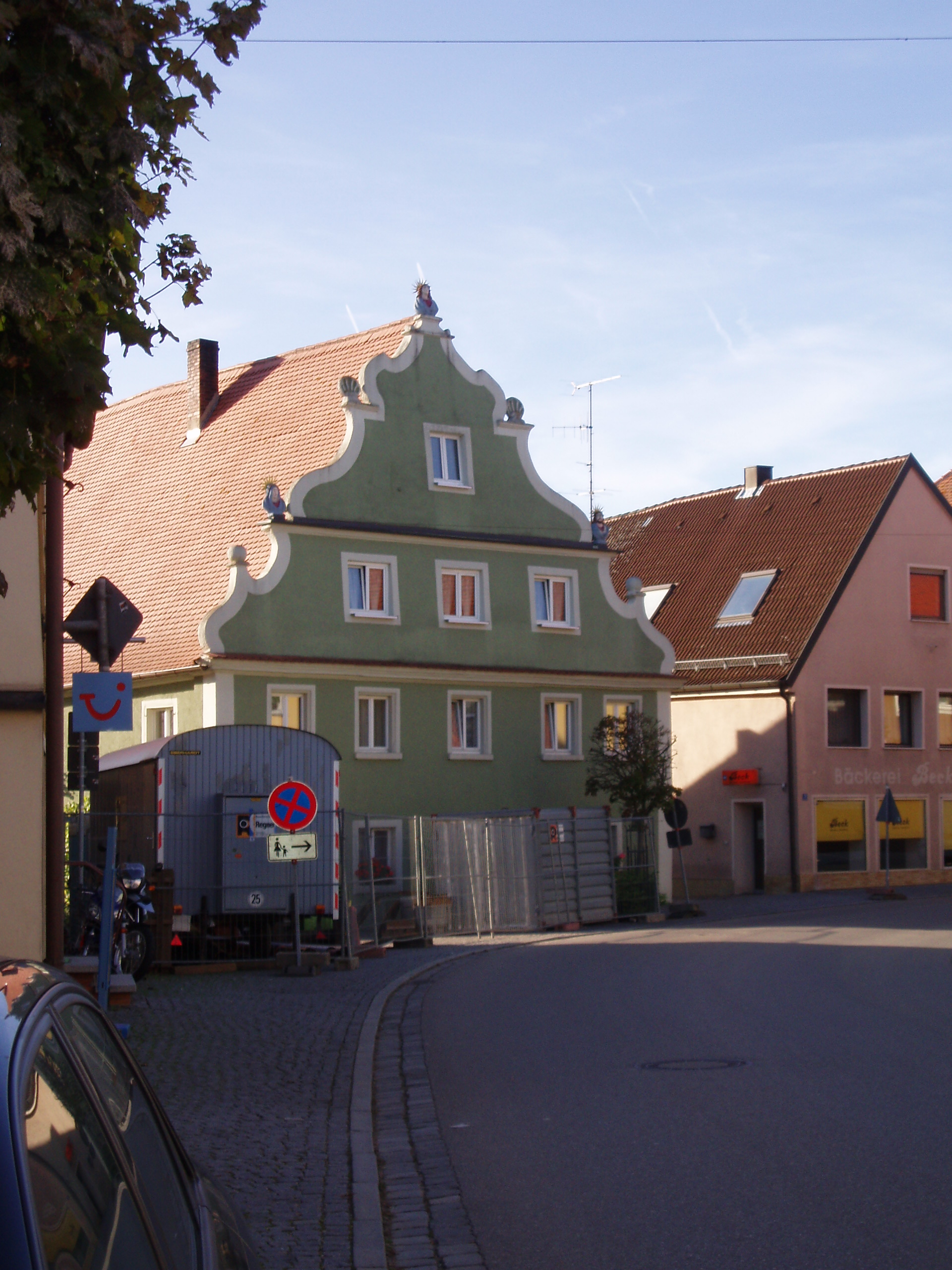 Poststall Herrieden, Vordere Gasse 21